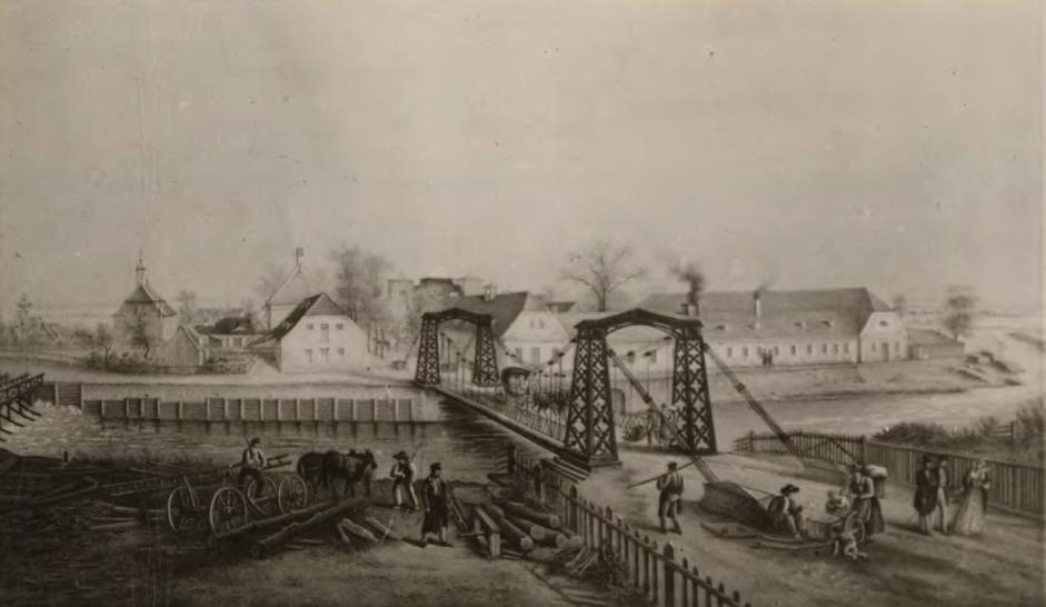 Malapane in Oberschlesien mit der Königlichen Hütte und der Hängebrücke über dem Fluss Malapane